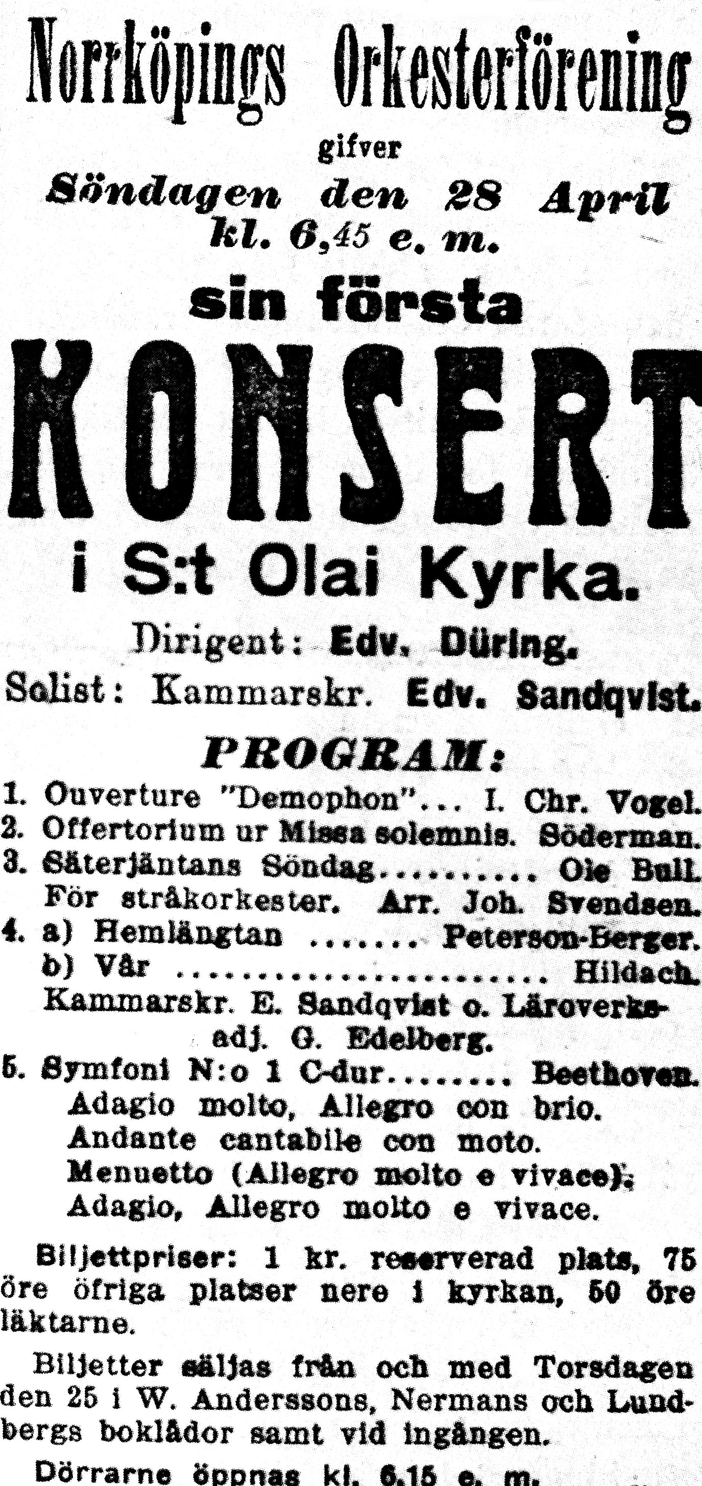 Norrköpings orkesterförening. First consert. Advertisment.